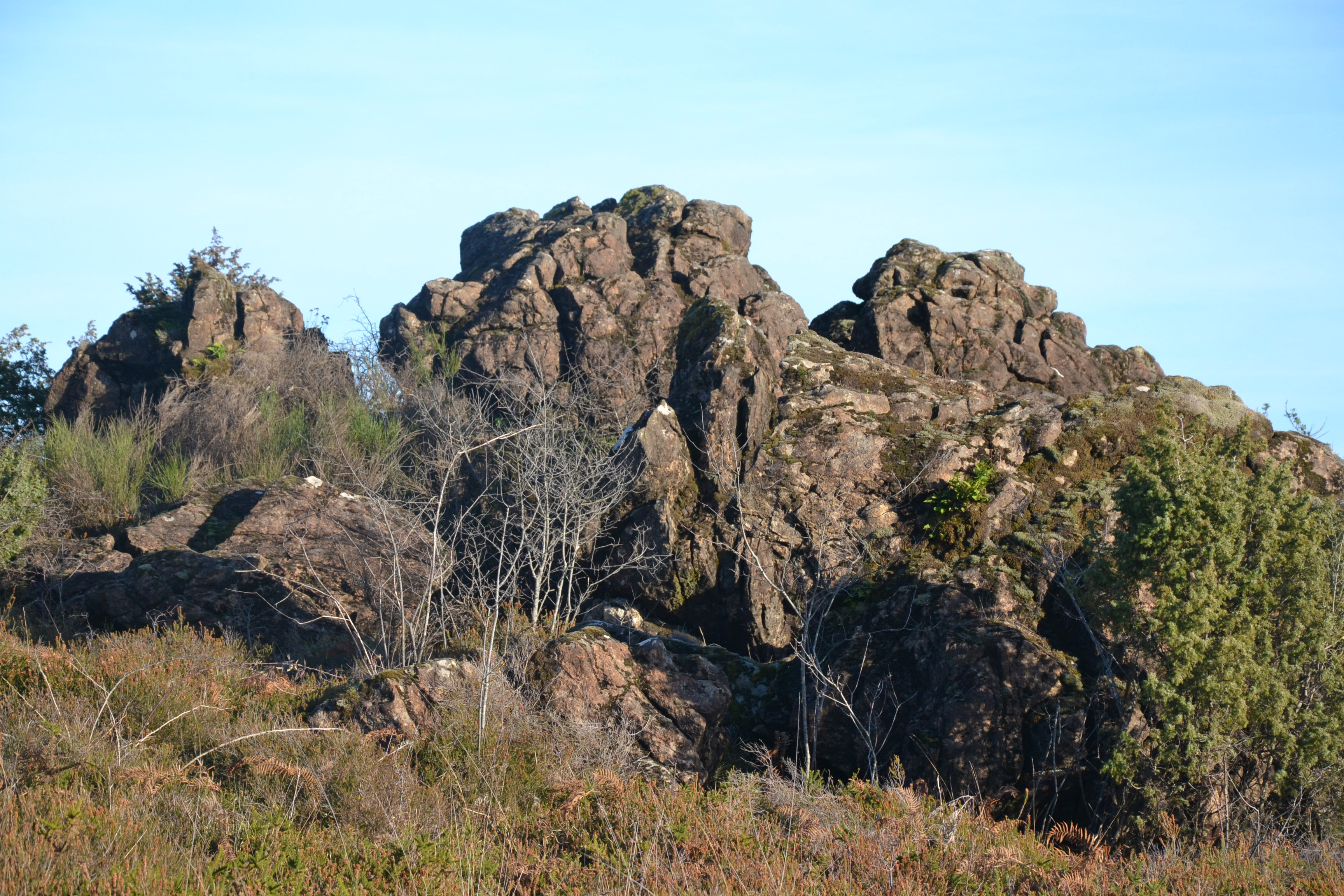 Paysage de la lande serpentinicole de la Flotte et du Cluzeau (Château-Chervix, Haute-Vienne, France).